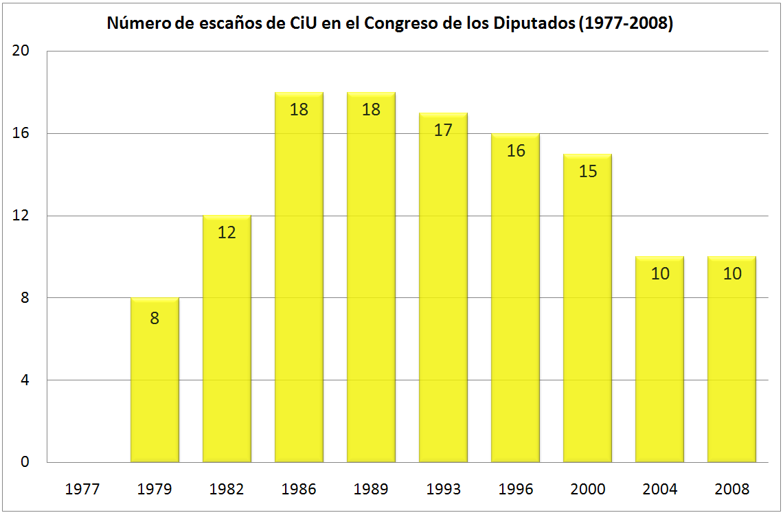 Evolución del número de escaños de CiU en el Congreso de los Diputados